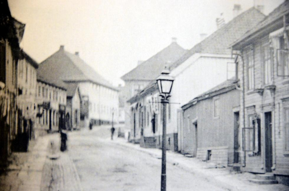 Altenburggården i Skien; taket og et av vinduene ses i midten av bildet